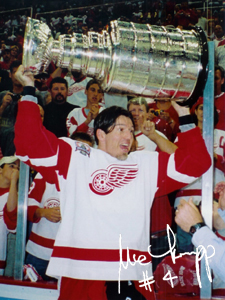 Uwe Krupp so Stanley Cupom (2002)